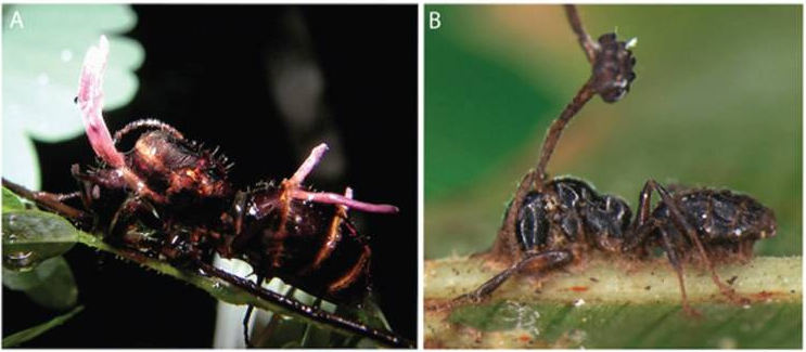 (A) reine Camponotus zombie (B) ouvrière Camponotus zombie